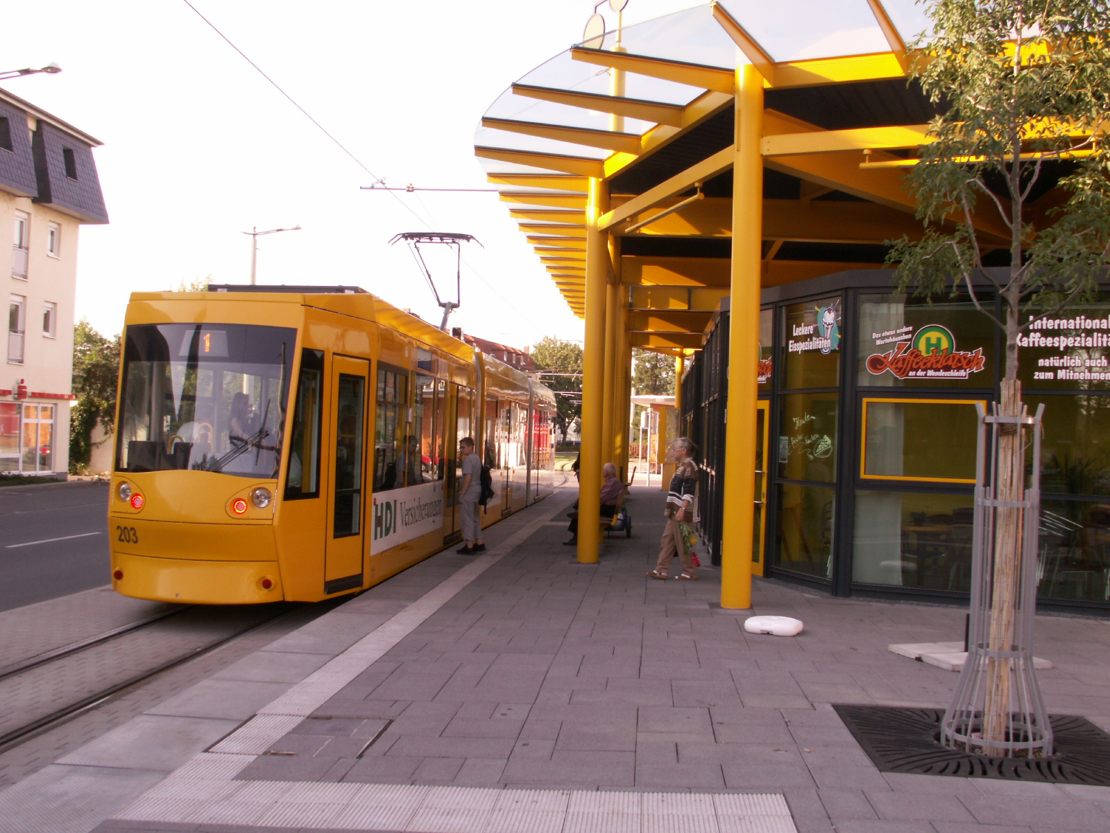 Geraer Bahn 2007